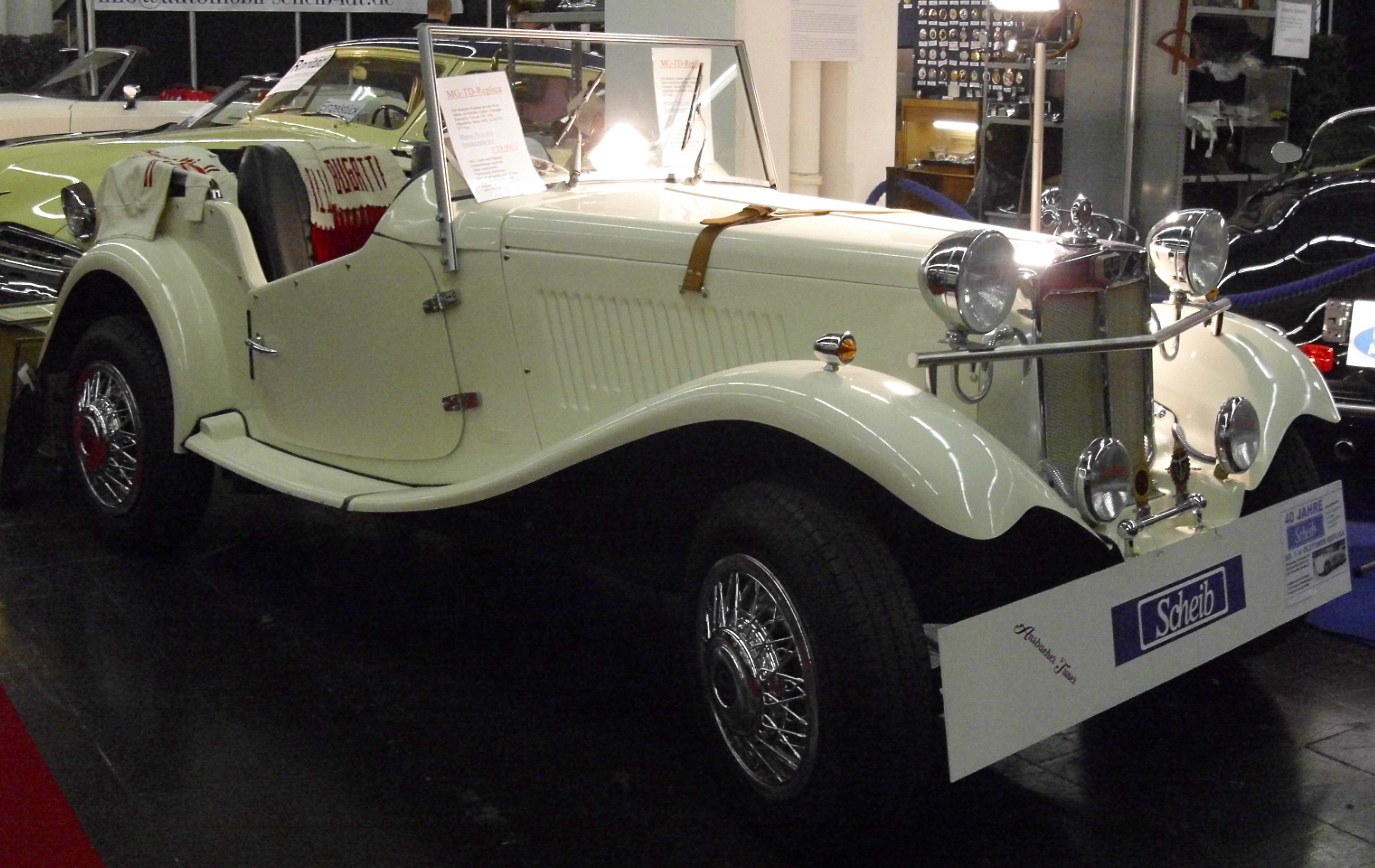 Scheib MG TD Replika